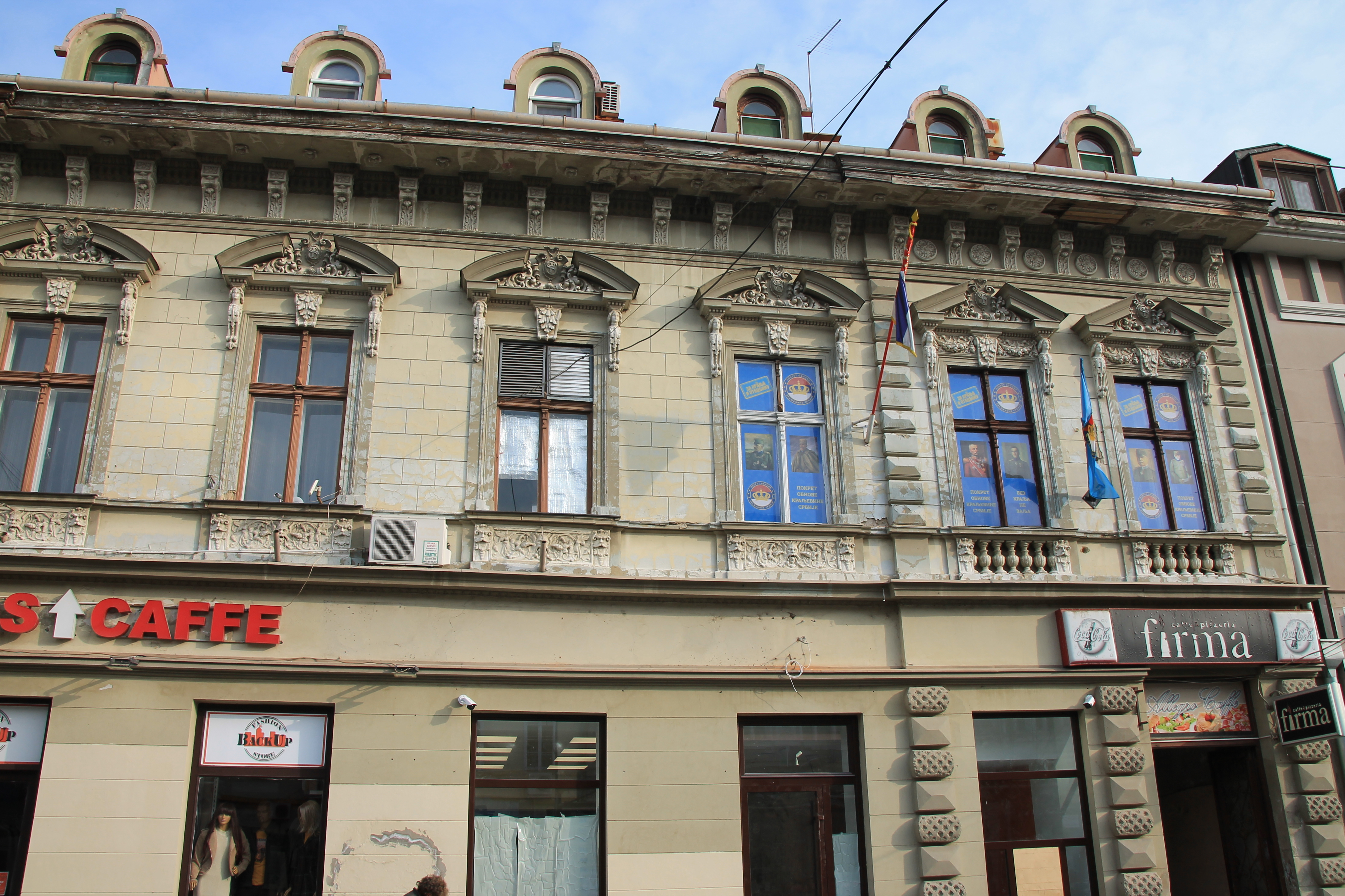 Staro jezgro Zrenjanina